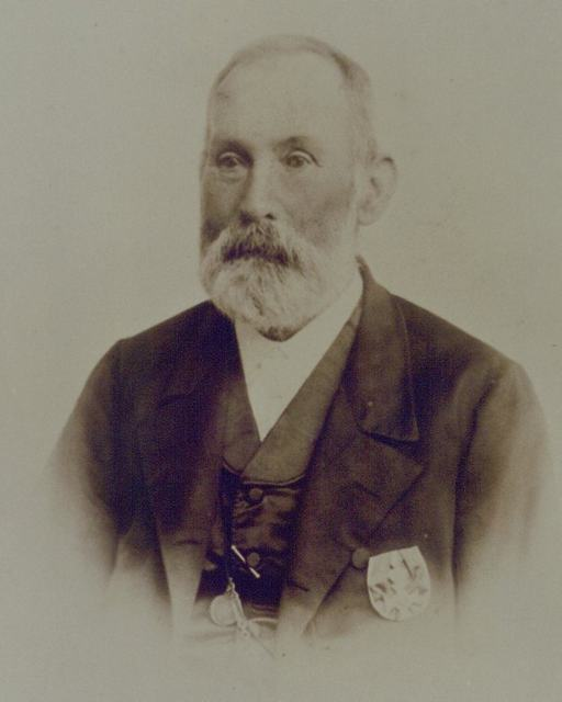 Johannes Raab (* 3. April 1826 in Kirdorf; † 31. Oktober 1881 ebenda), hessisch-homburger Politiker und ehemaliger Abgeordneter des Landtags von Hessen-Homburg.